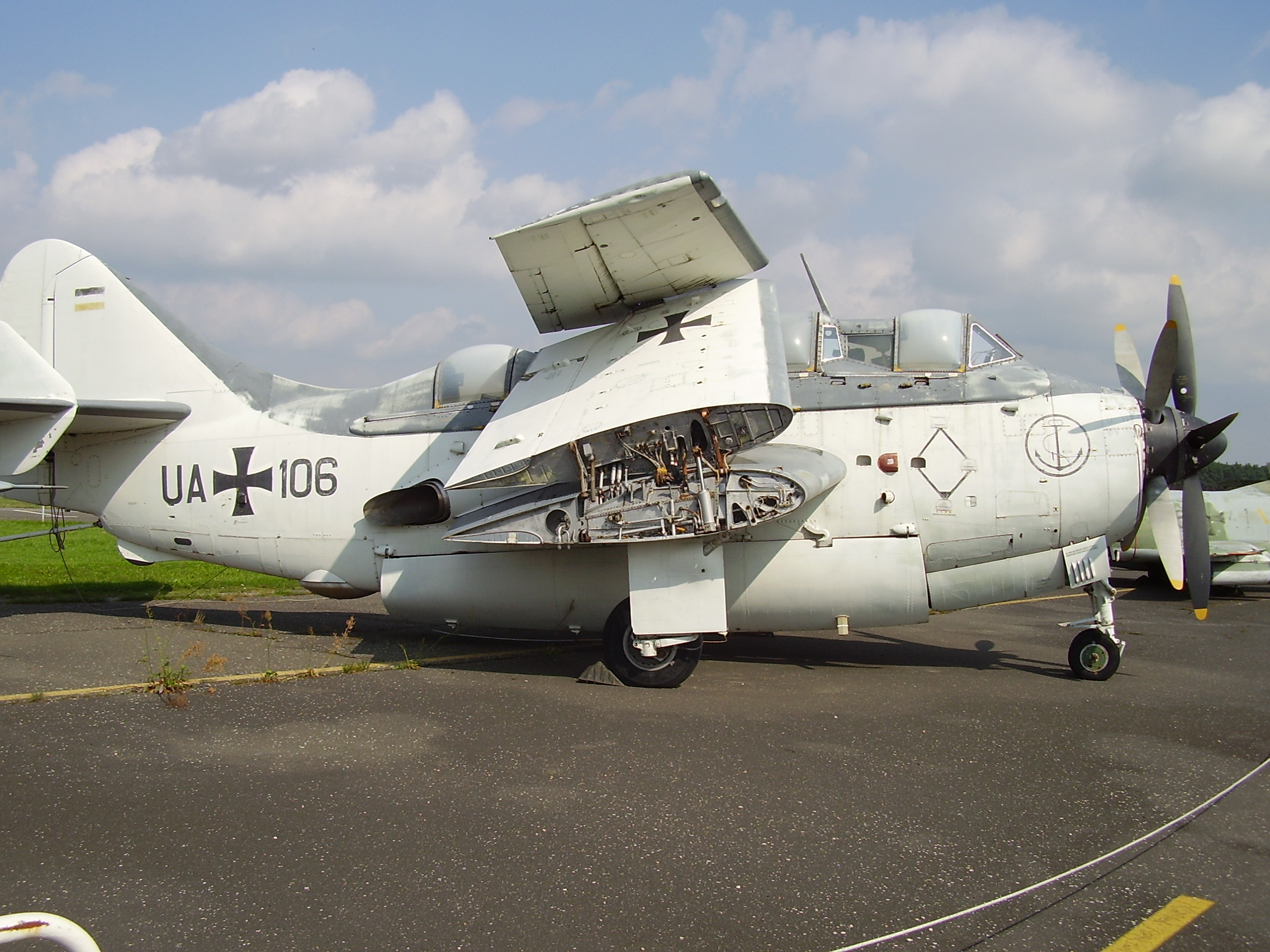 Luftwaffenmuseum der Bundeswehr; Airforce Museum of the Bundeswehr; Berlin-Gatow, A.S.4